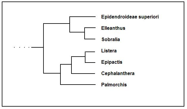 Clado Neottieae